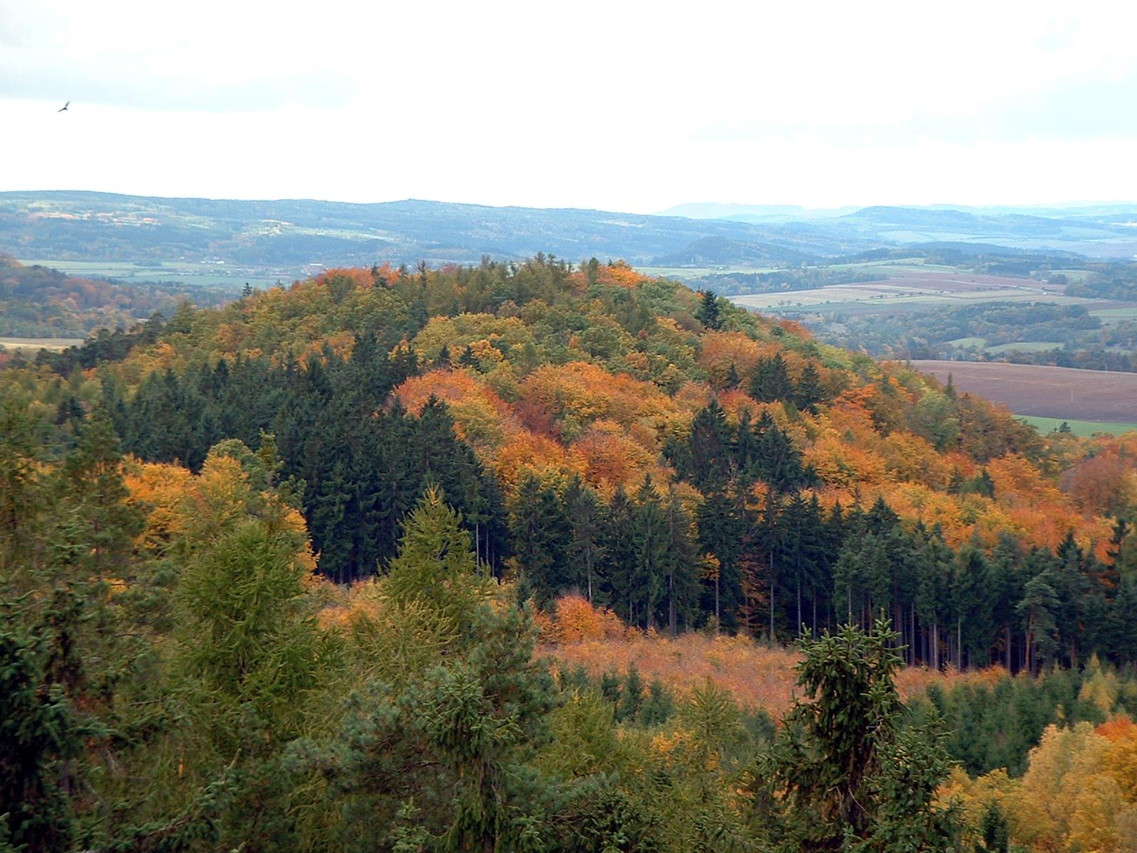 Vlčí vrch u Jesenice, pohled z rozhledny